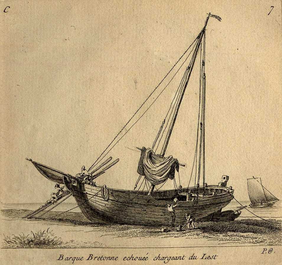 Dessin de Pierre Ozanne, gravé par Yves Le Gouaz. Bibliothèque nationale de France.